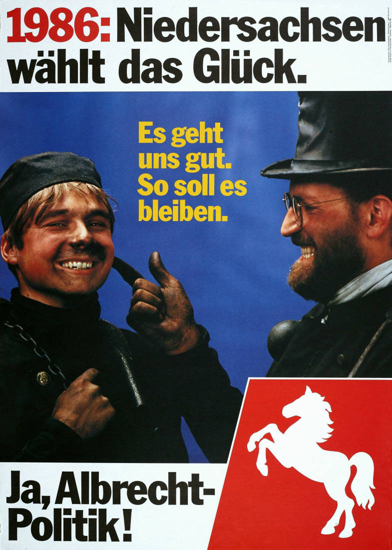 1986: Niedersachsen wählt das Glück. Es geht uns gut. So soll es bleiben. Ja, Albrecht-Politik! Abbildung: Schornsteinfeger - Niedersachsenross Plakatart: Motiv-/Textplakat Auftraggeber: Verantw.: CDU Niedersachsen, Hannover Drucker_Druckart_Druckort: Willy F. P. Fehling GmbH, Hannover Objekt-Signatur: 10-008 : 560 Bestand: Landtagswahlplakate Niedersachsen (10-008) GliederungBestand10-18: Landtagswahlplakate Niedersachsen (10-008) » CDU Lizenz: KAS/ACDP 10-008 : 560 CC-BY-SA 3.0 DE